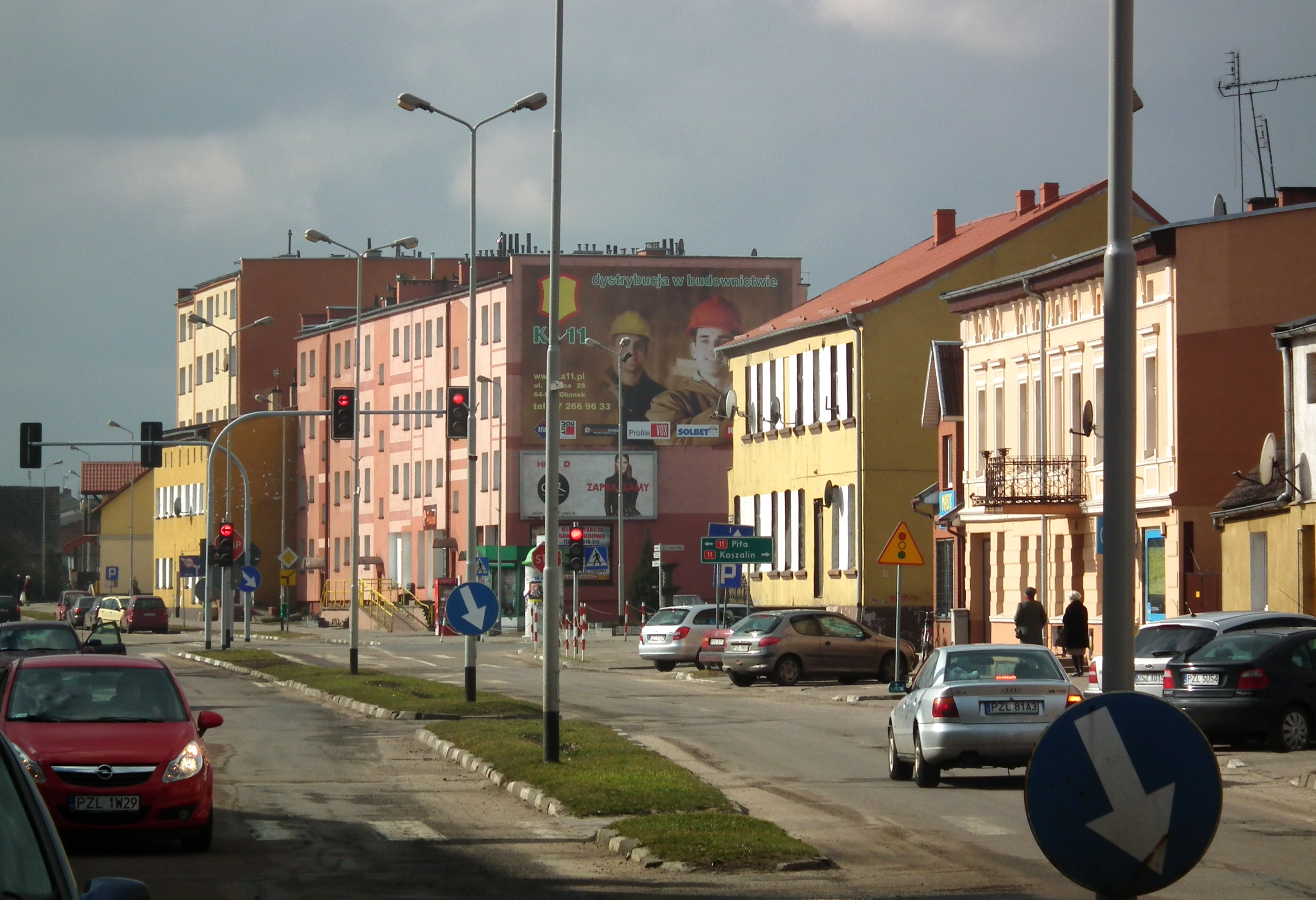 Ul. Niepodległości w centrum Okonka.